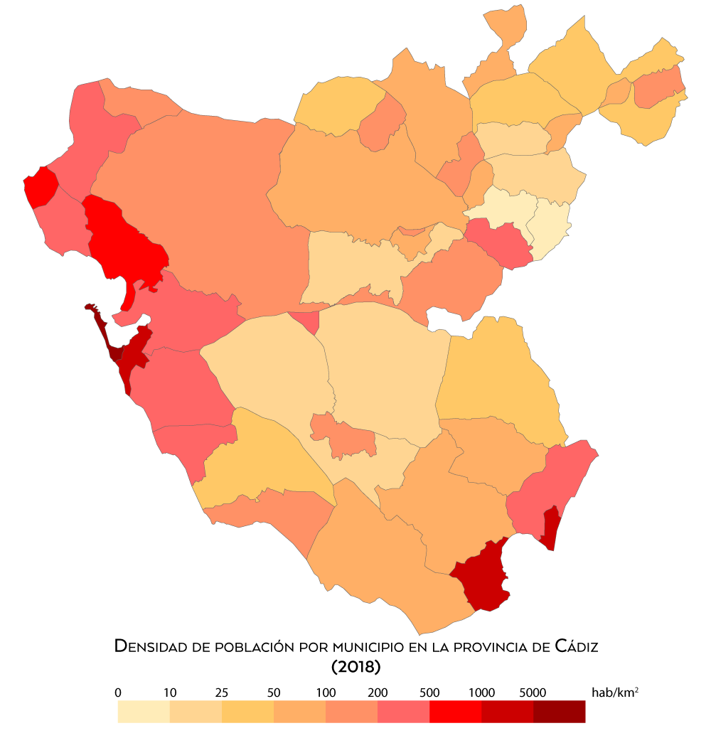 Densidad de población por municipio en la provincia de Cádiz 2018